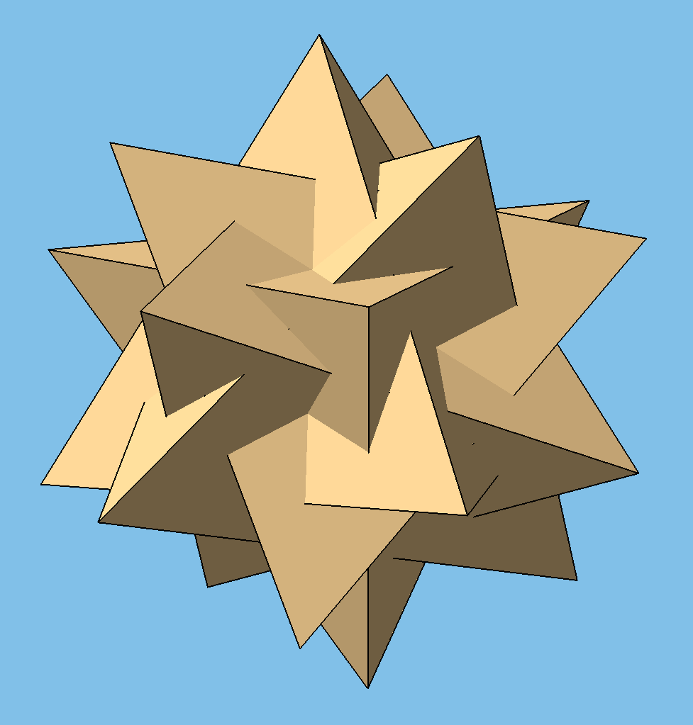 Sternkörper aus fünf Tetraedern (linkshändige Version)